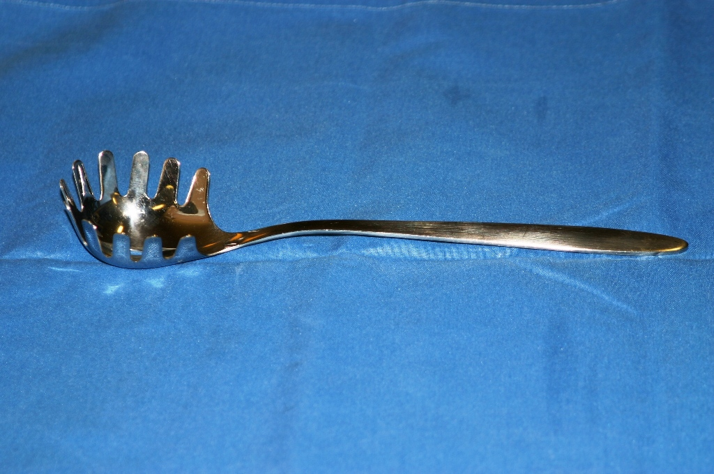 Spagetisläffel.